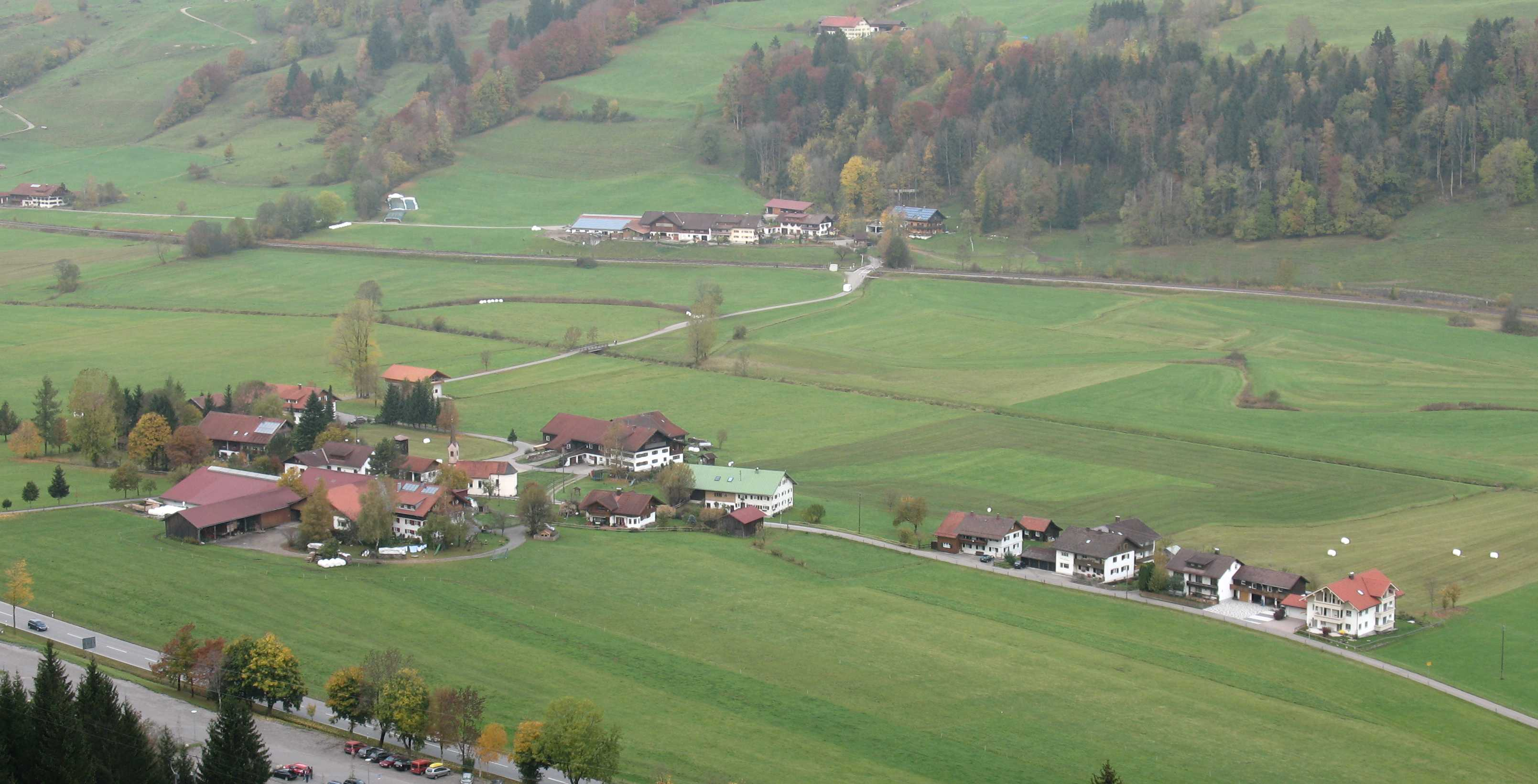 Aufnahme von Ratholz von Süd-Osten aus